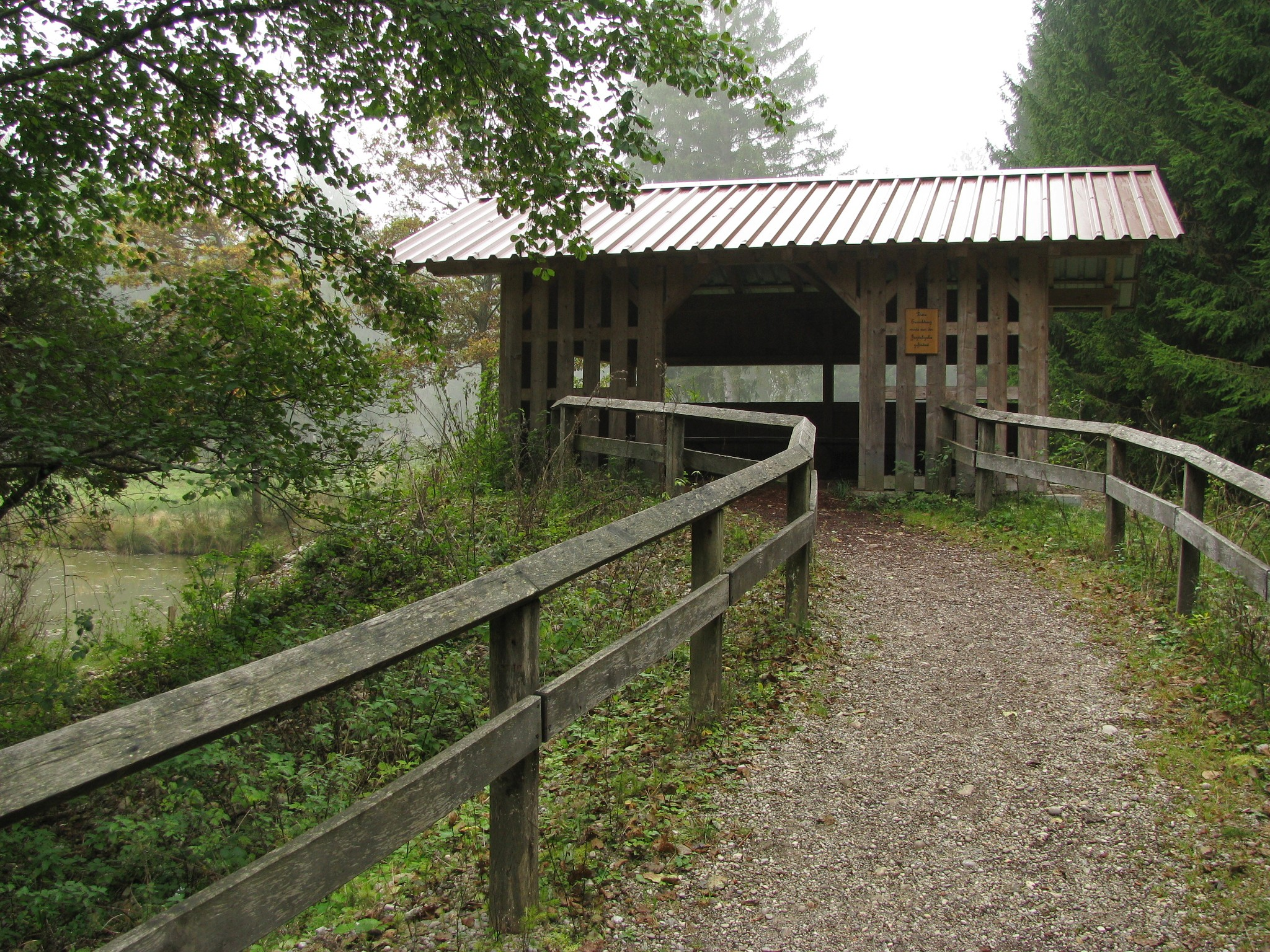 Unterstand der Wildbeobachtungsstelle am Ludwigsgeräumt.